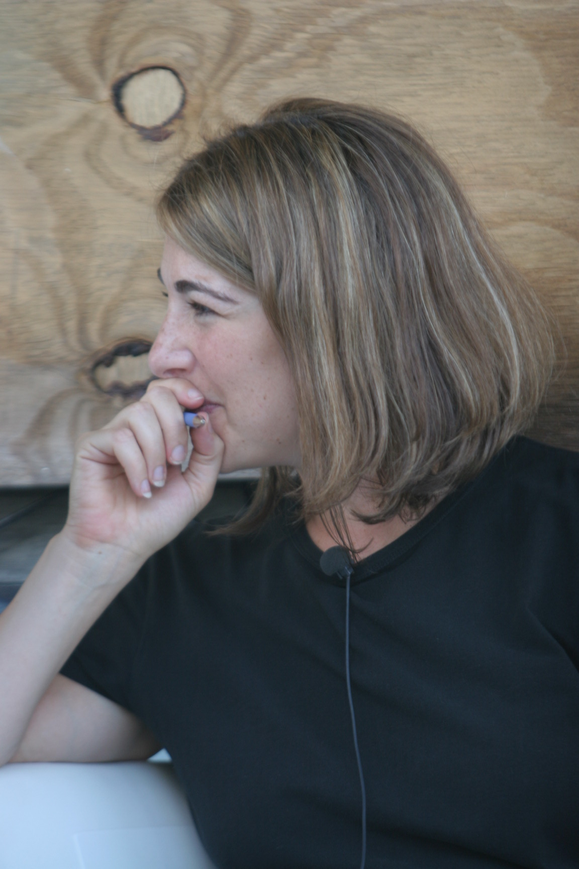 Canadian journalist/activist Naomi Klein